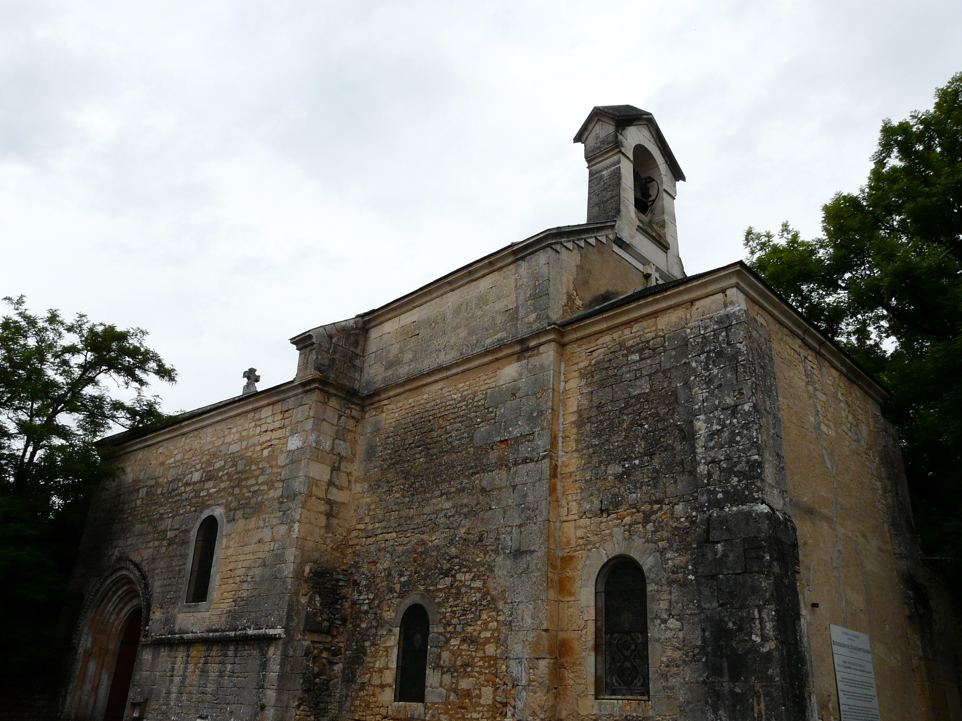 L'église Saint-Saturnin, Mayac, Dordogne, France Object location45° 16′ 53.3″ N, 0° 56′ 22″ E